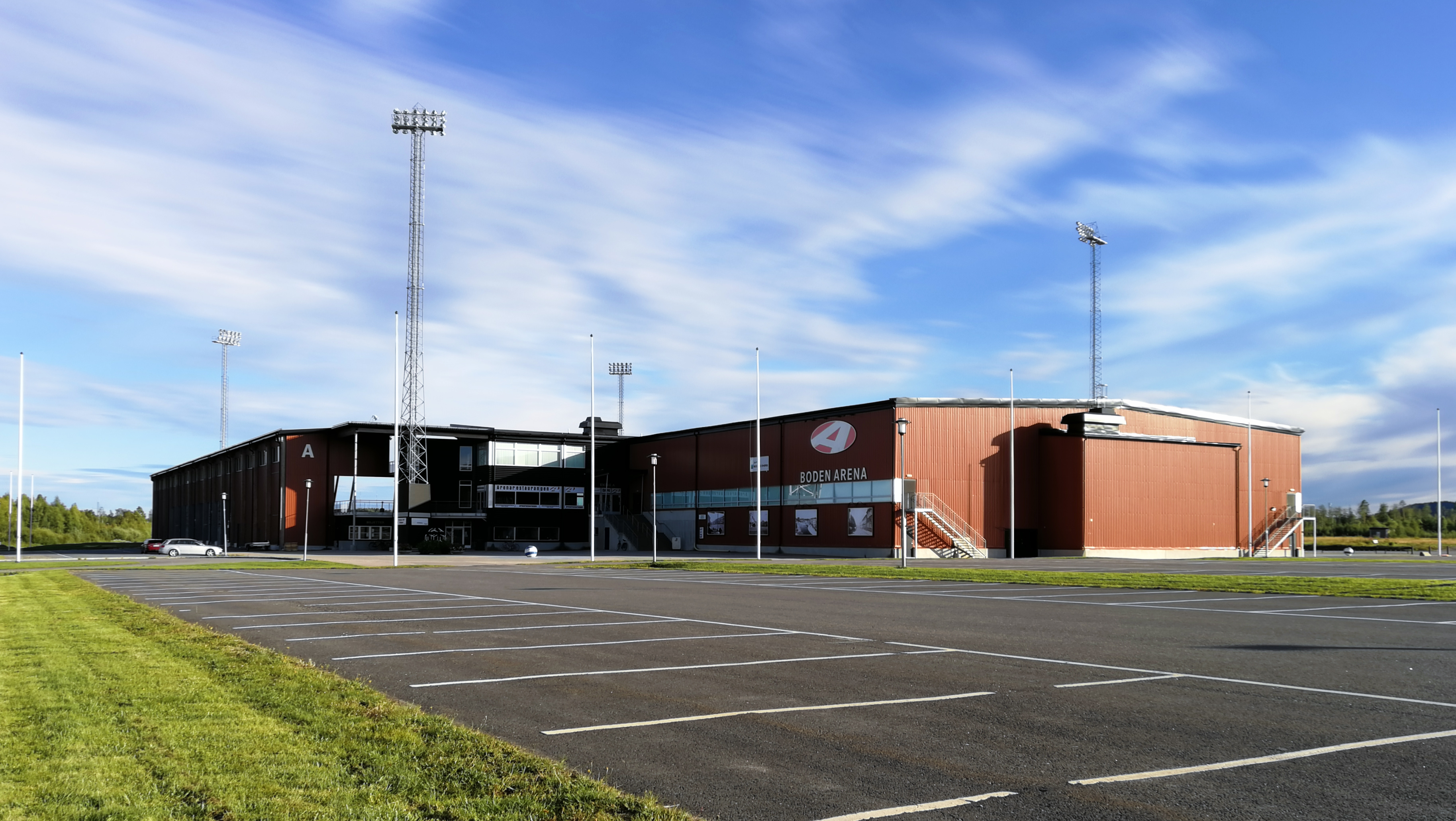 Boden Arena, en evenemangsarena i Boden, invigd den 6 juni 2008. Augusti 2017.